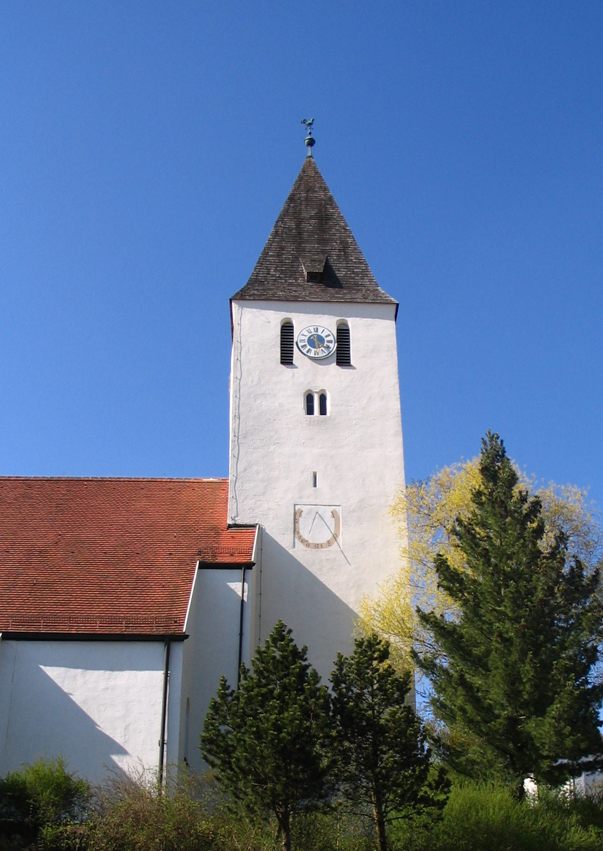 Pfarrkirche Maria Himmelfahrt Teugn, Landkreis Kelheim, Niederbayern